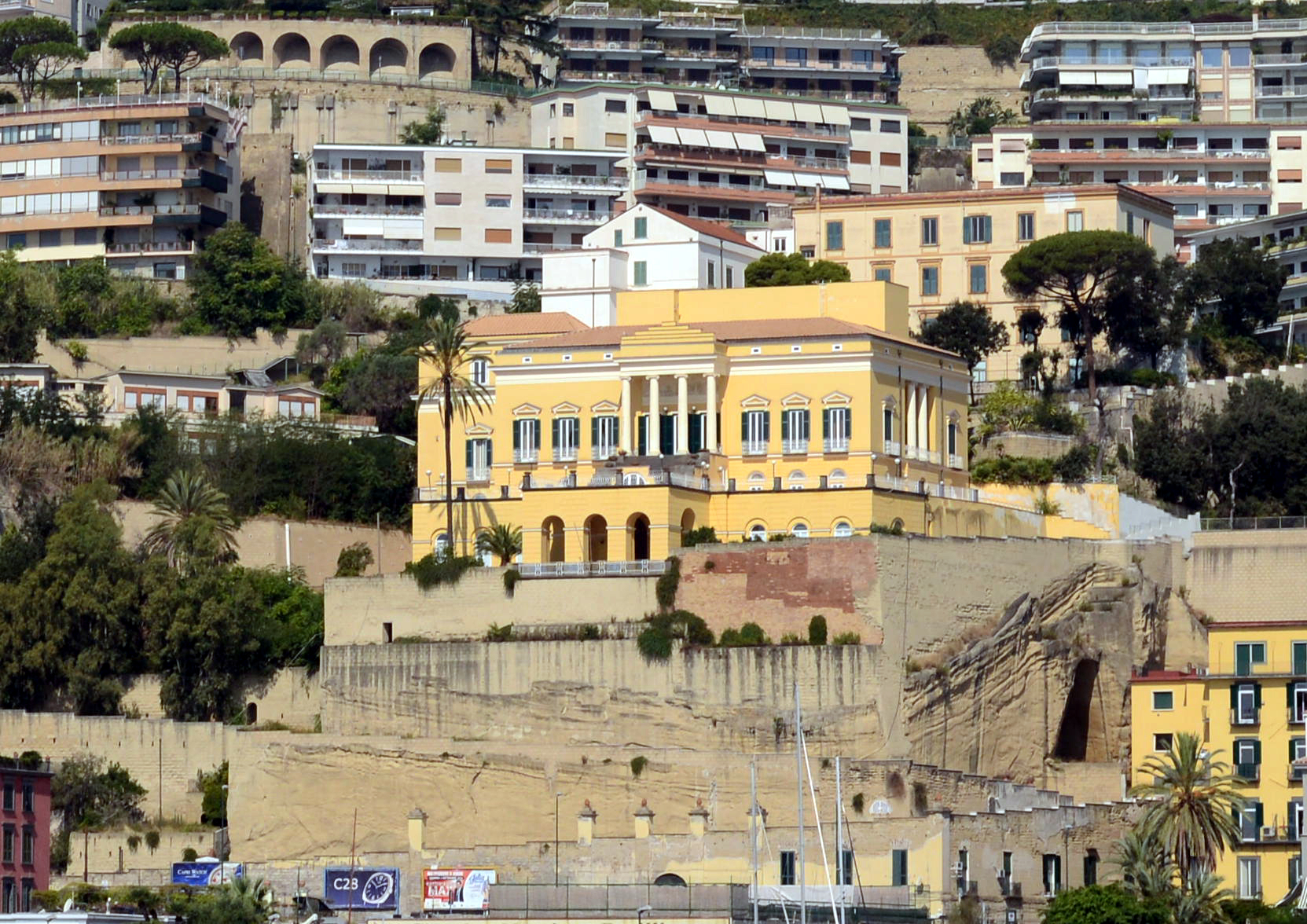 Il Circolo Nautico Posillipo, bagno Elena, villa Guercia e villa Doria d'Angri